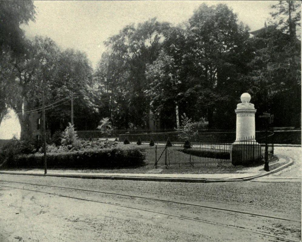 The Charter Oak Memorial in Hartford, Connecticut.